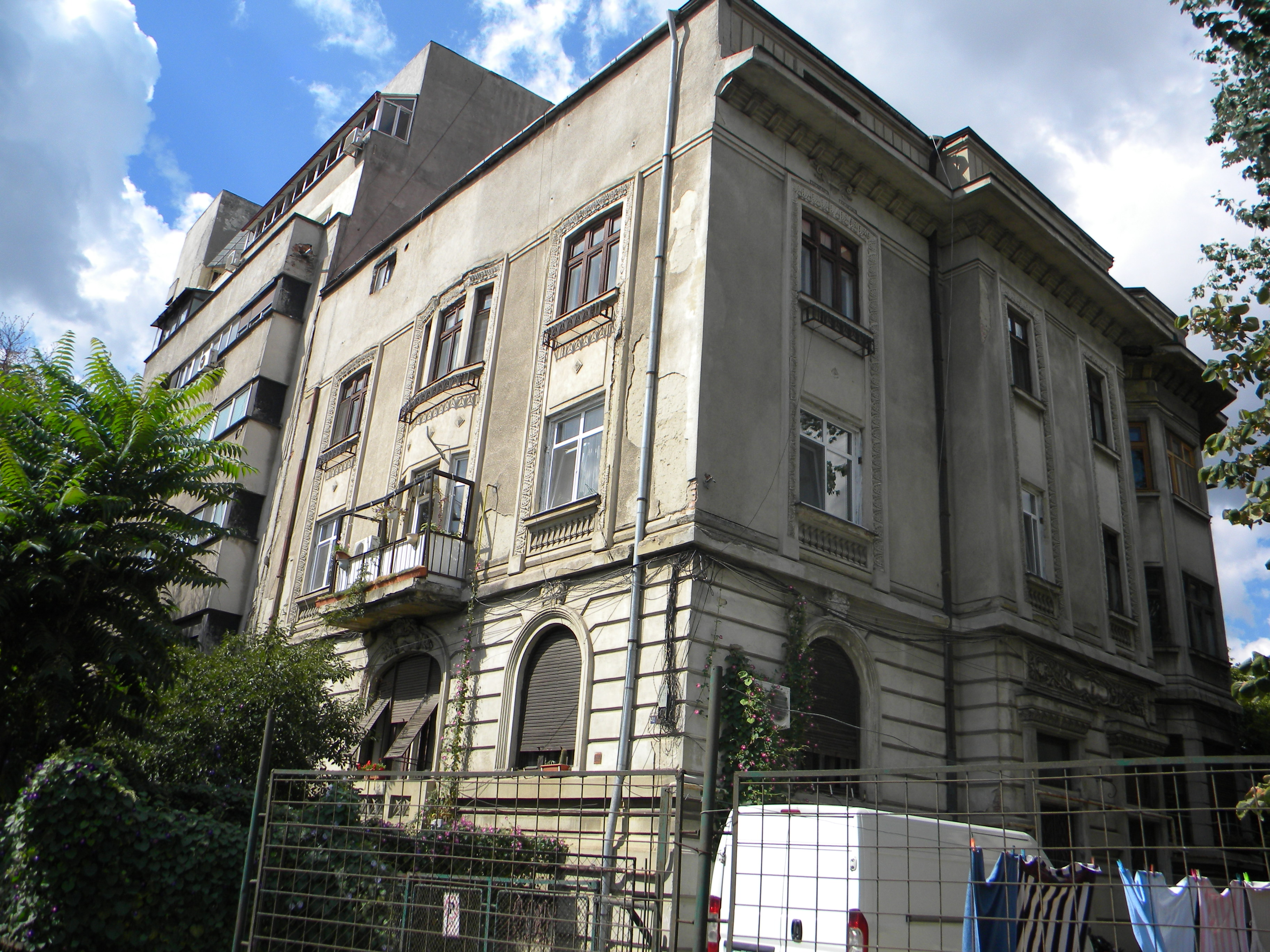 Bucuresti, Romania, Str. Corneliu Coposu nr. 41B